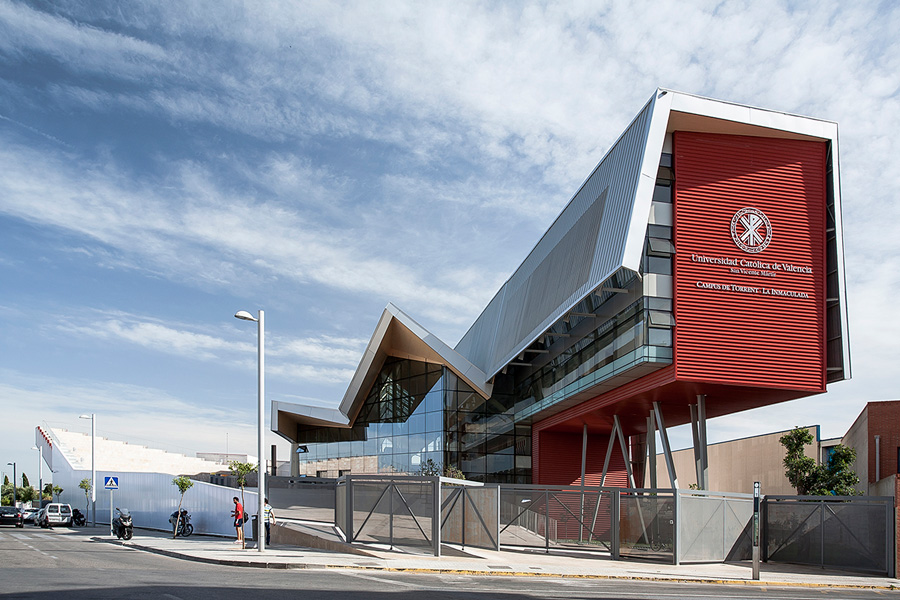 Sede de La Inmaculada